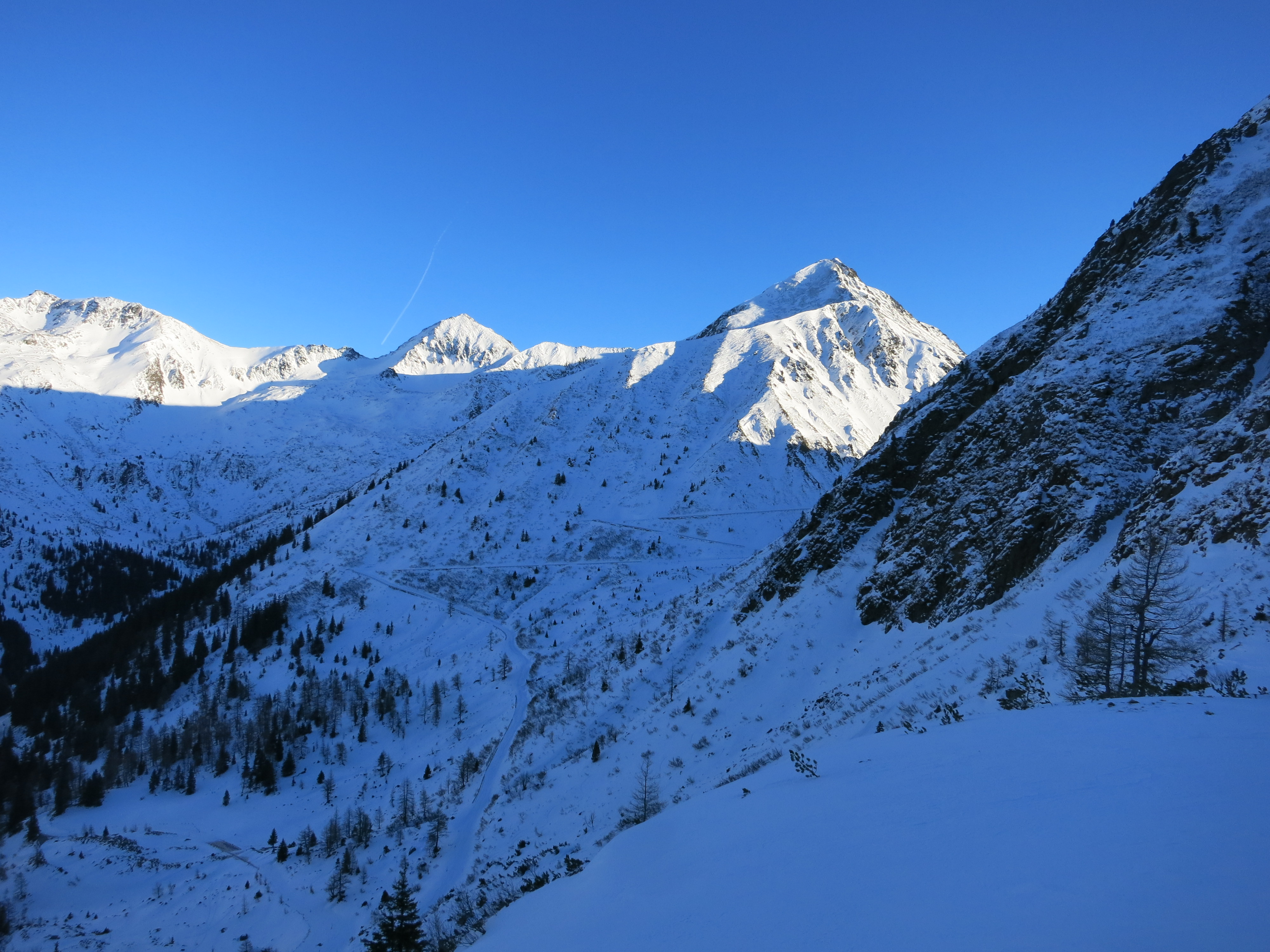 Im Winter ist der Sölkpass nicht geräumt aufgrund der Schneemassen. Die Aufnahme wurde bei einer Skitour auf das Deneck gemacht. This file shows the Nature Park with the ID 6399 in Austria.